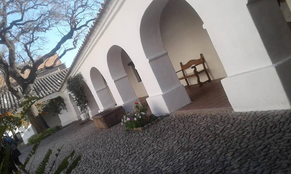 El Cabildo de Salta es actualmente sede de dos museos: del Museo Histórico del Norte en la planta baja y el Museo Colonial y de Bellas Artes en la planta alta. El 9 de enero de 1937, fue declarado Monumento Histórico Nacional por Ley 12345 del Poder Ejecutivo de la Nación. Este edificio colonial ubicado en la calle Caseros, frente a la plaza 9 de Julio de la Ciudad de Salta, Argentina, fue sede de las autoridades desde el año 1626 hasta el año 1888. El Cabildo en un principio albergo la policía y fue sede de la Casa de Gobierno hasta 1880. Luego se vendió en subasta pública, fue ocupado por inquilinos, locales de negocios y hotel. Más adelante fue parcialmente demolido: desaparecieron la sala capitular, tres arcos de la planta baja y cuatro de la alta. En 1945 fue restaurado por el arquitecto Mario Buschiazzo. Es el cabildo más completo y mejor conservado de la Argentina.Cabildo de Salta